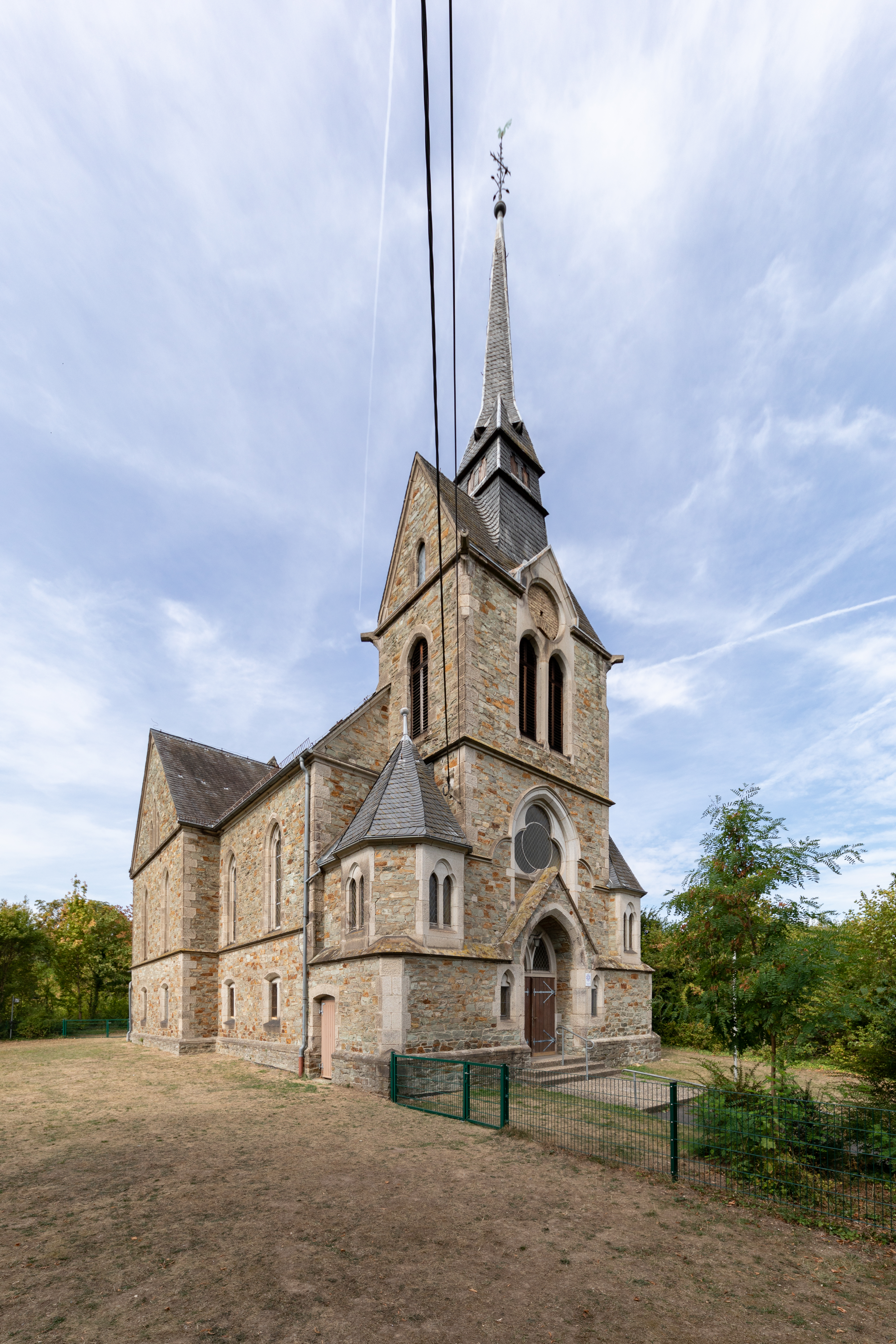 Die 1892 eingeweihte Evangelische Kirche Rambach